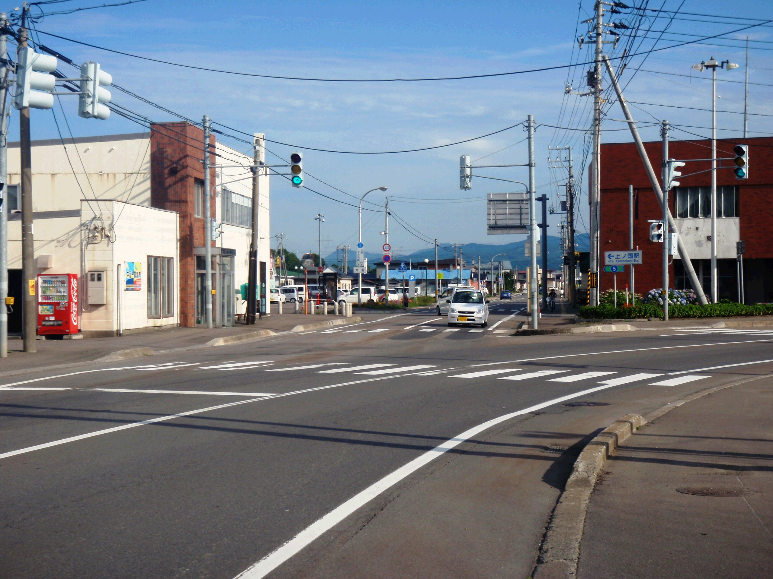 国道228号と道道5号の三叉路。上ノ国町。